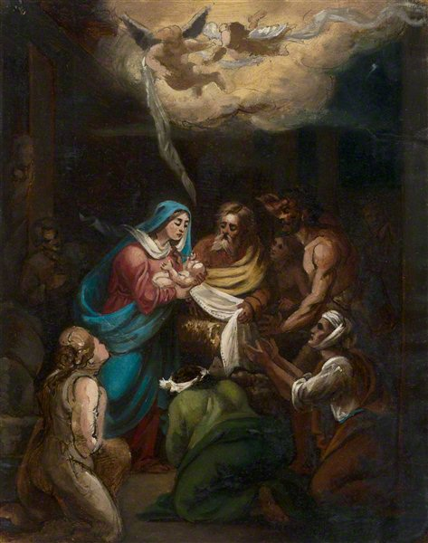 Pokłon pasterzy